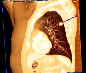 3D Volume Rendering der Lunge. Der Pfeil zeigt auf den Tumor. Beschreibung: 3D Volume Rendering der Lunge. Der Pfeil zeigt auf den Tumor. Quelle: selbst erstellt --Lange123 17:18, 11. Nov. 2004 (CEST)